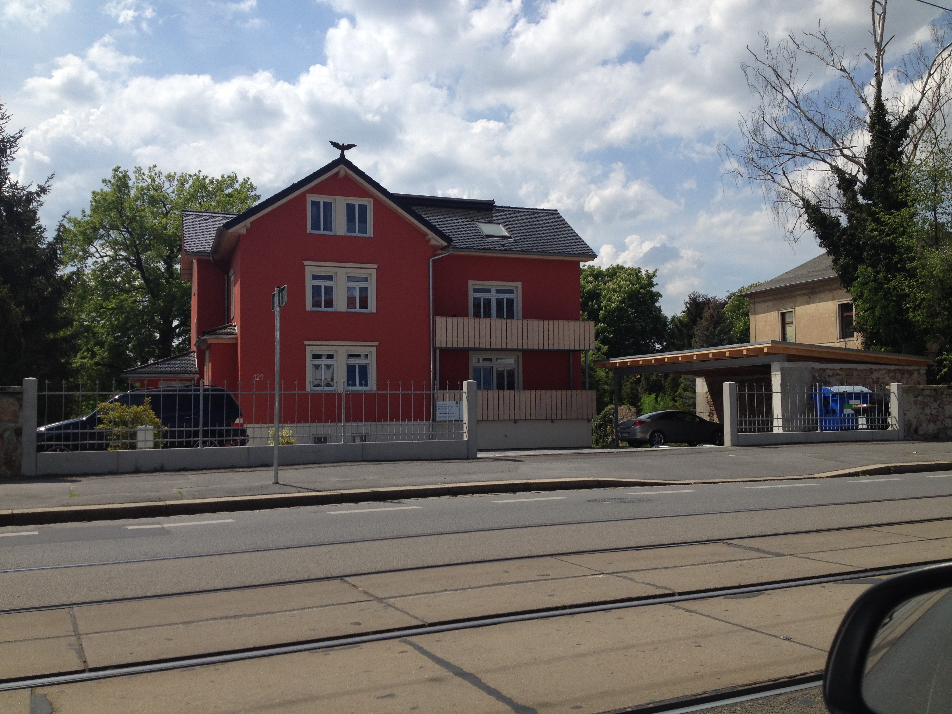 Radebeul Wohnhaus Meißner Straße 121, rechts im Carport die Reste der historischen Nebengebäudewand